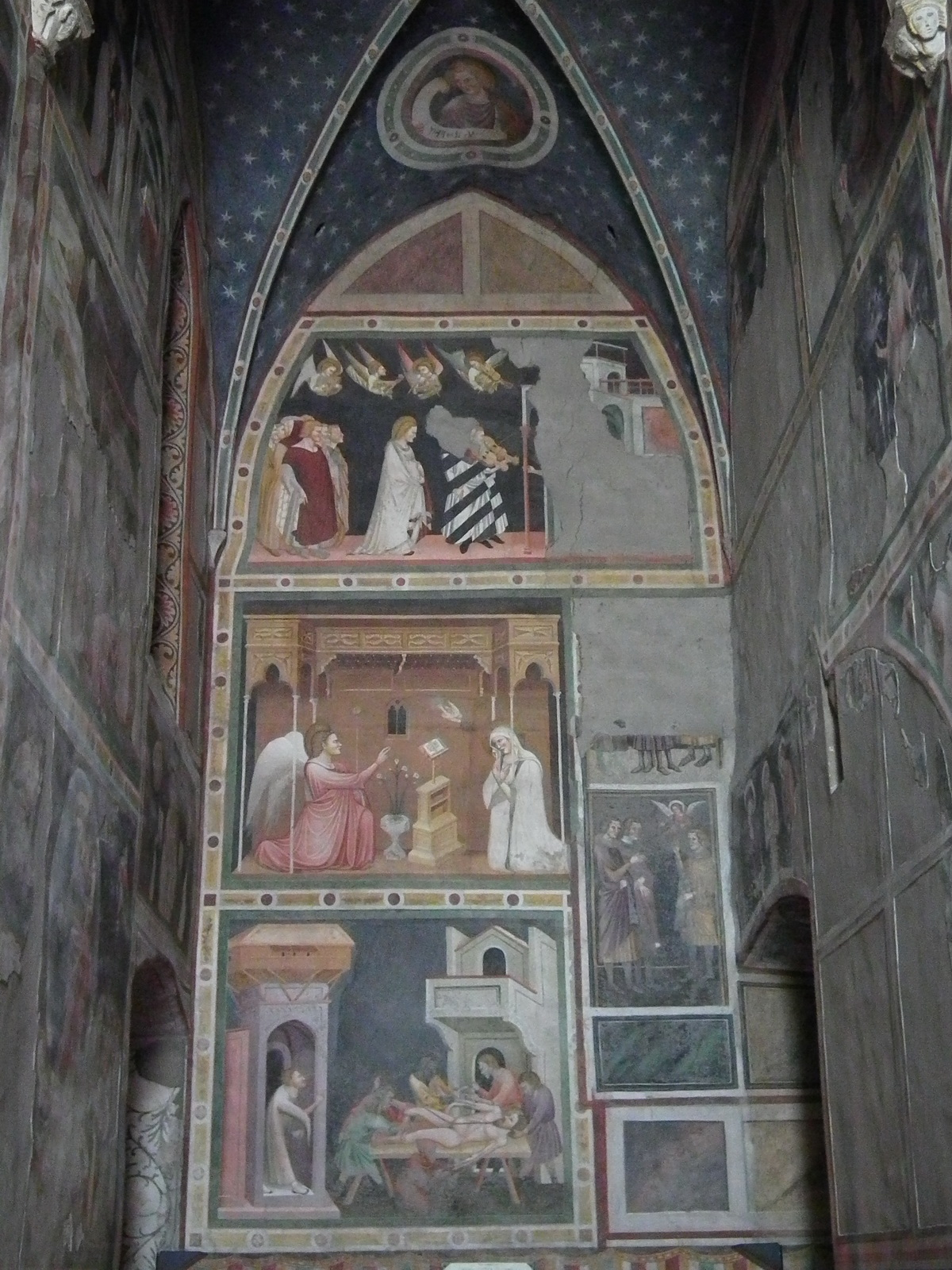 Cappella di San Giovanni Church of the Dominican Order Native nameChiesa dei DomenicaniLocationBolzano, ItalyCoordinates46° 29′ 51.39″ N, 11° 21′ 07.39″ E